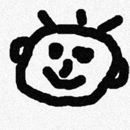 verrauschtes Graustufenbild eines "Gesichts"